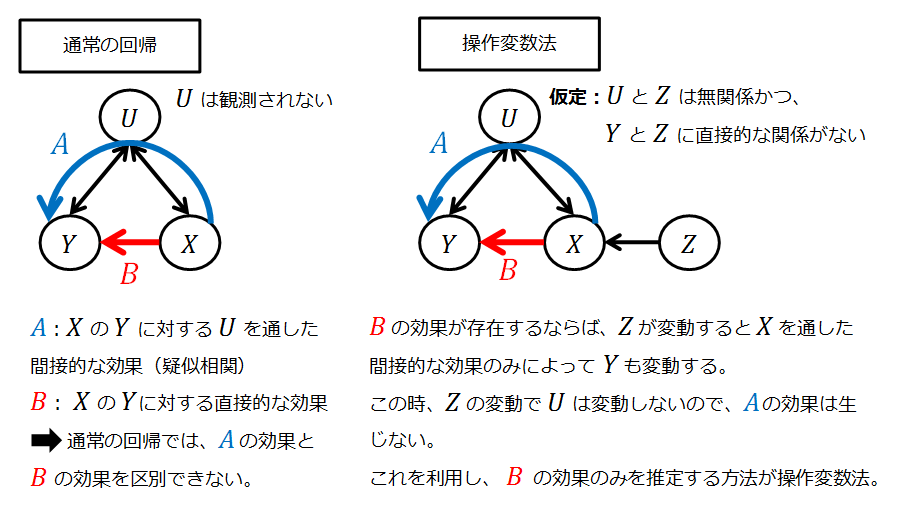 日本語による操作変数法の説明